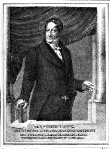 Bildnis des Mainzer Bürgermeisters Stephan Metz von C. Meyer nach Rosa Achenbach